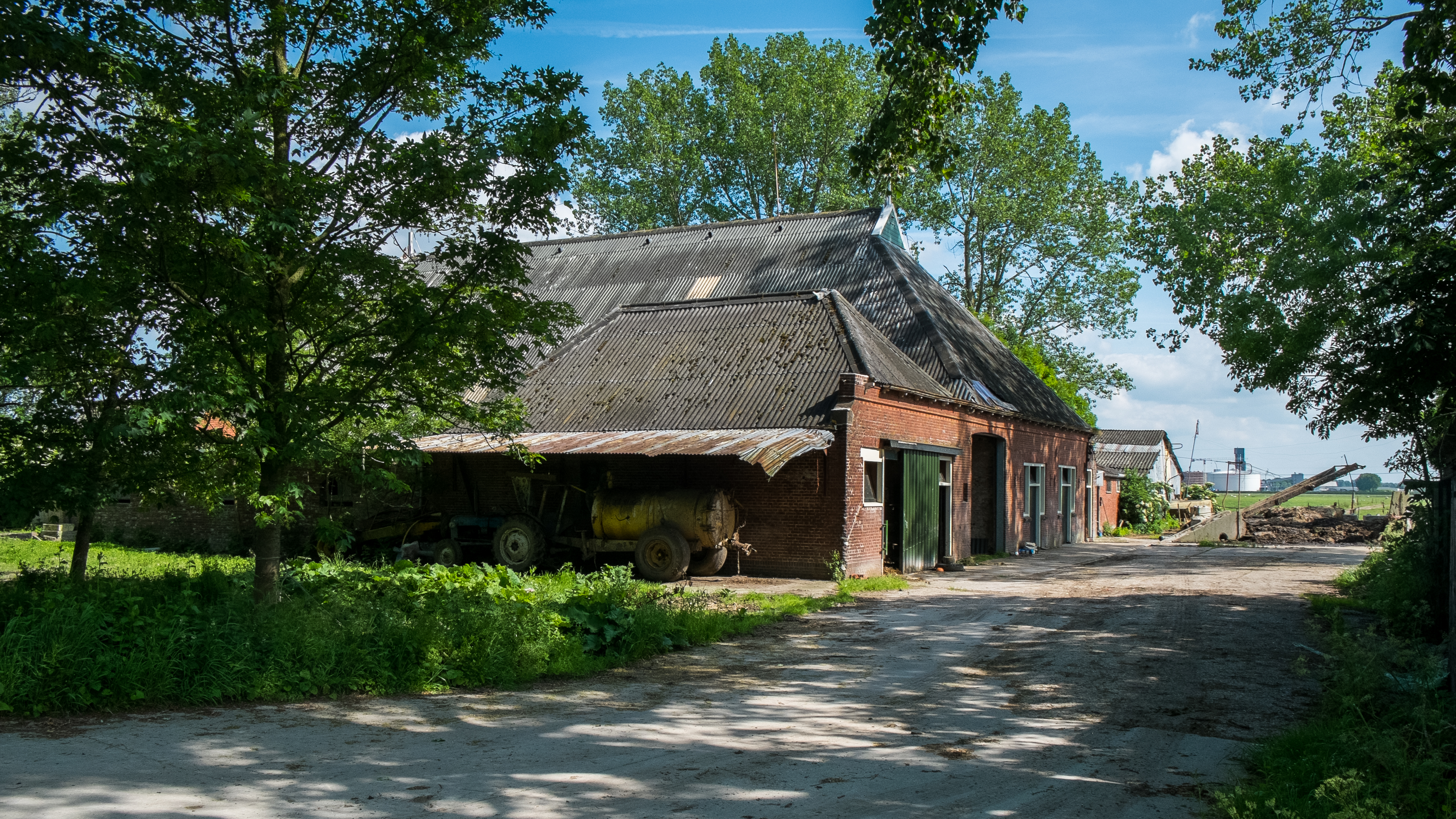 achterzijde boerderij Leegeweg 42